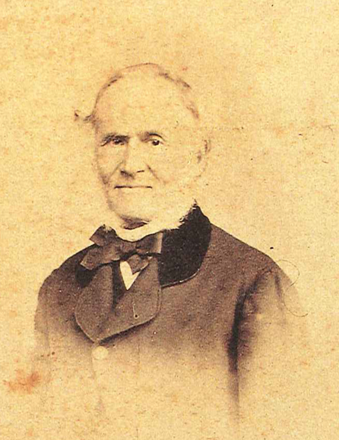 fotografia di Ernesto Capocci Belmonte